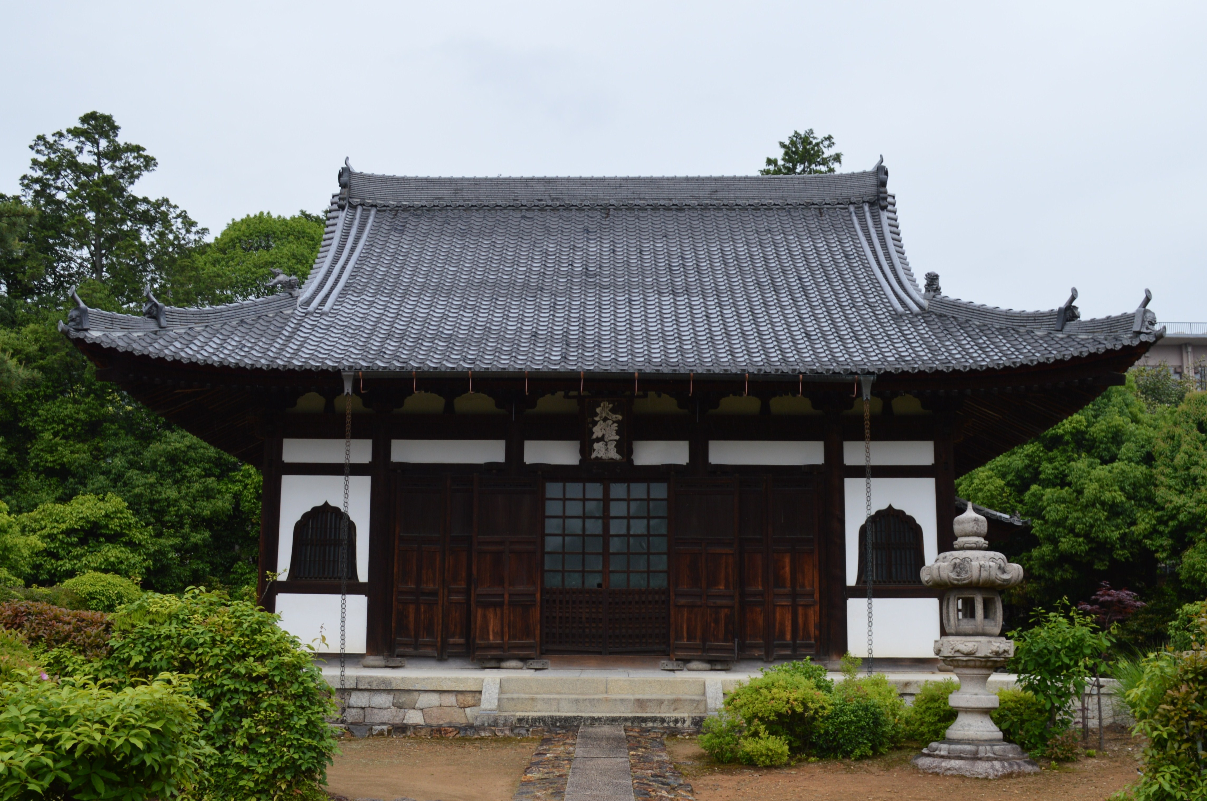 京都市北区等持院 真如寺 法堂（大雄殿）